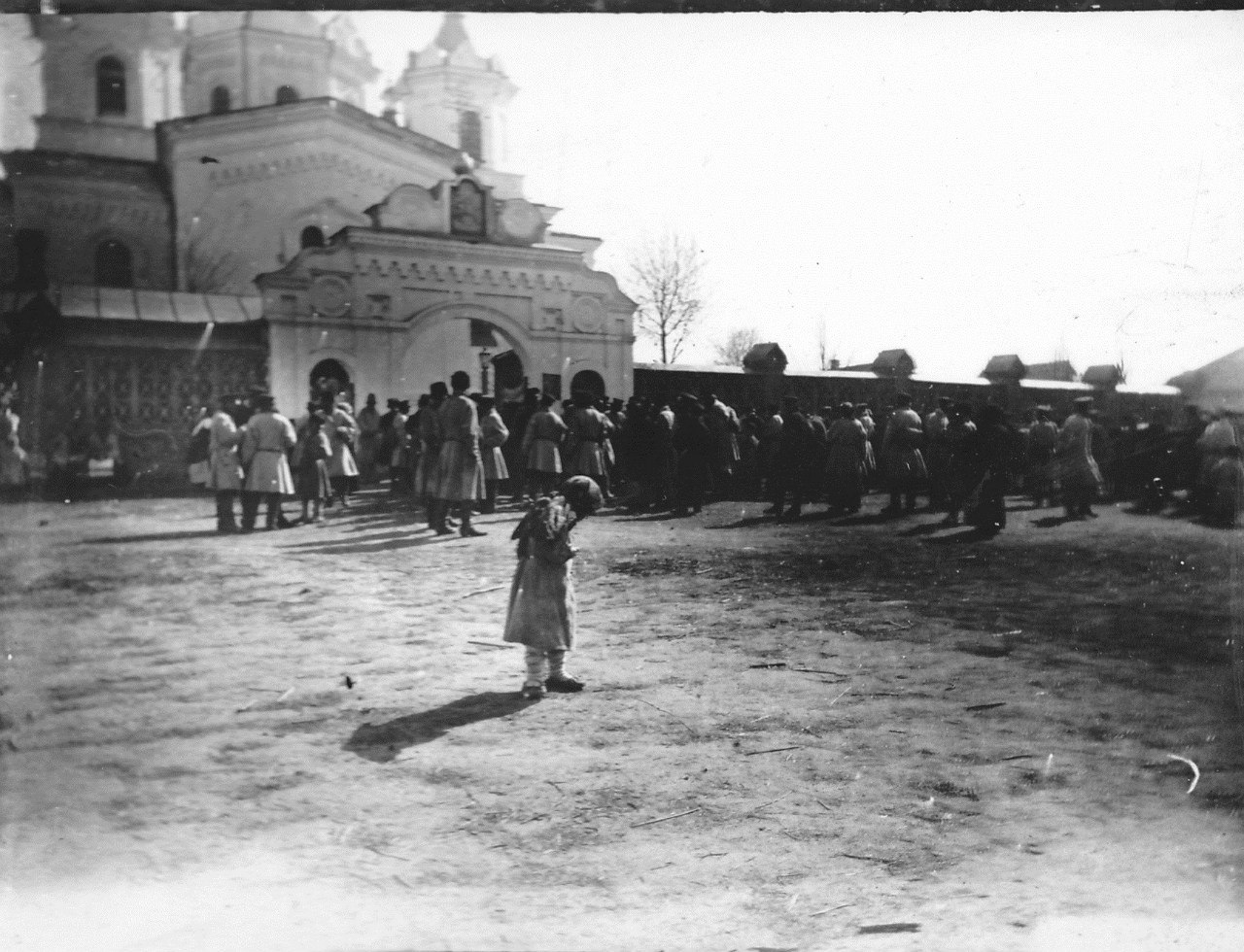 Беларуская (тарашкевіца): Хоцімск (Chocimsk), пляц Рынак (plac Rynak). Траецкая царква-мураўёўка